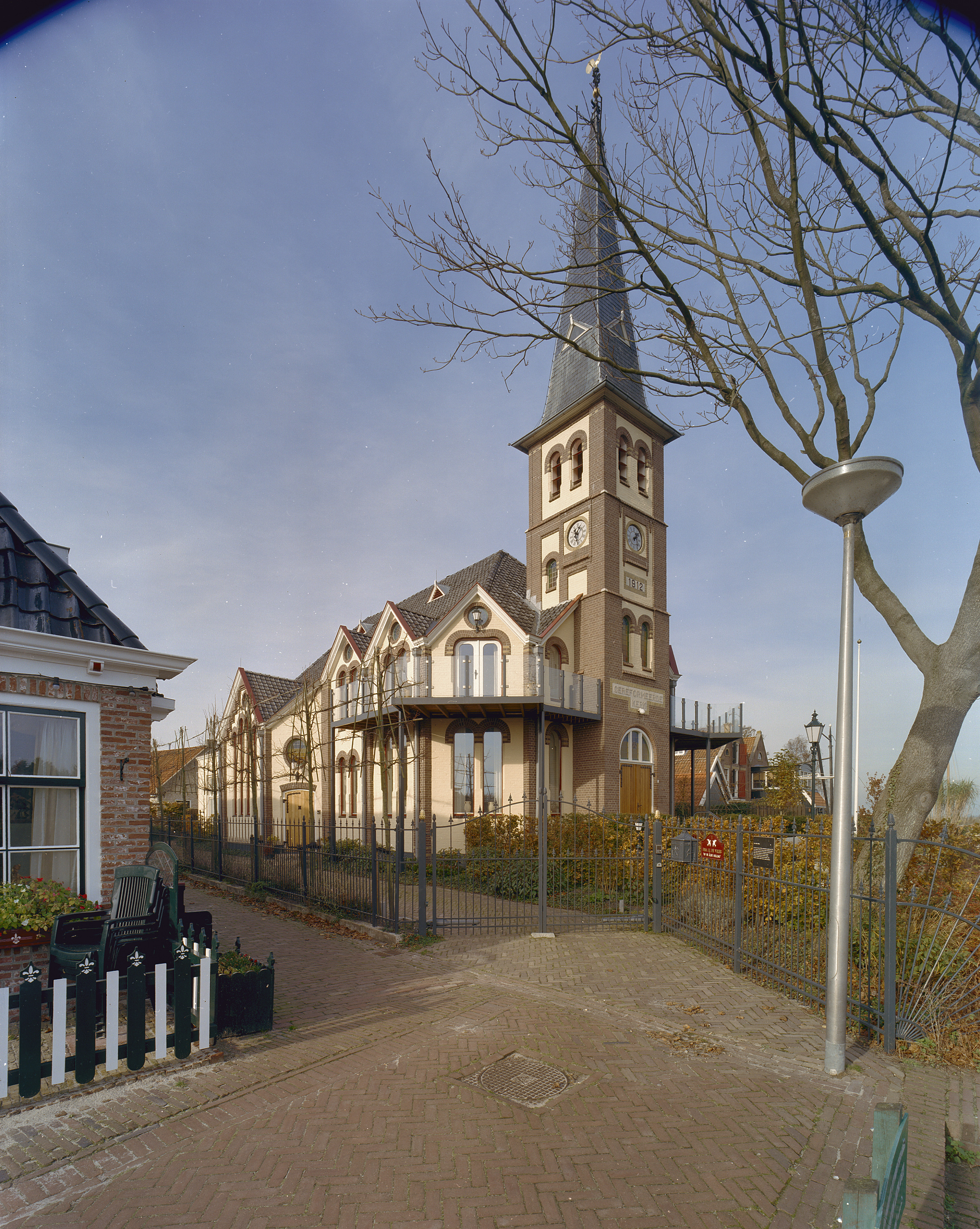 voormalige Gereformeerde Kerk: Exterieur overzicht kerk, voorbeeld hergebruik van een kerk tot woonhuis